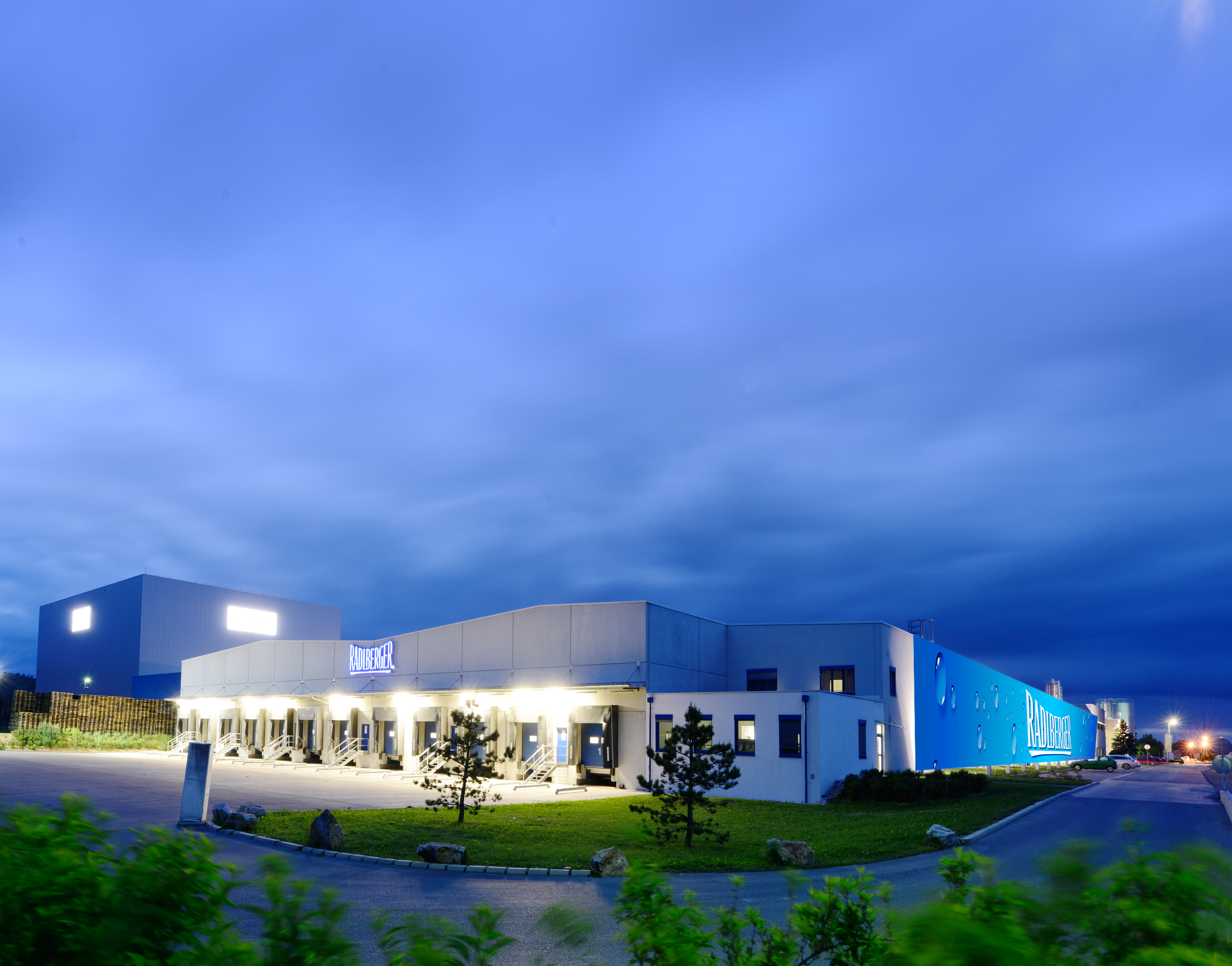 Radlberger Getränke